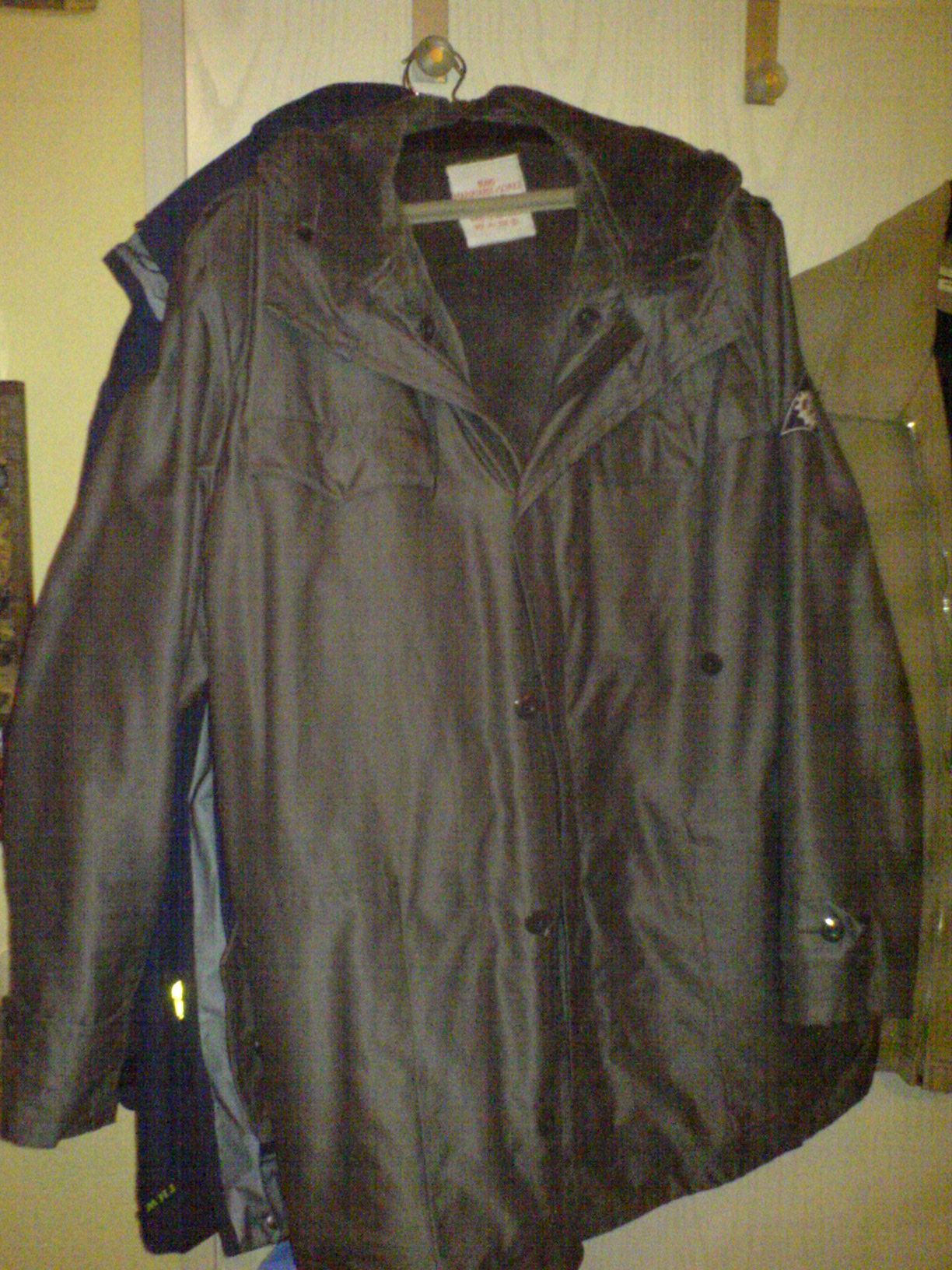 Parka des THW, im Stil der Bundeswehr Parkas, beschafft ab 1968